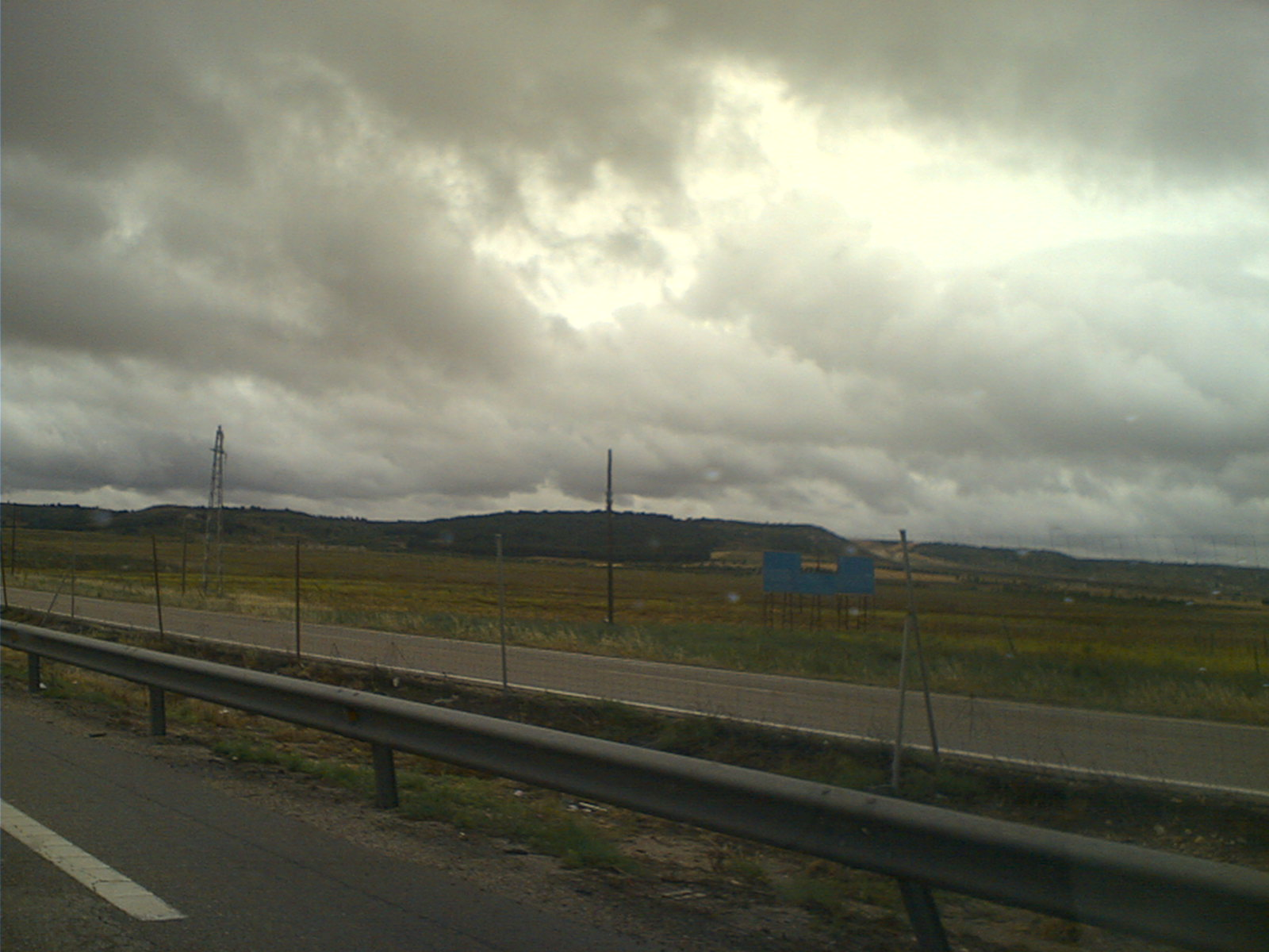 Paisaje de los páramos de Ontígola (Mesa de Ocaña)